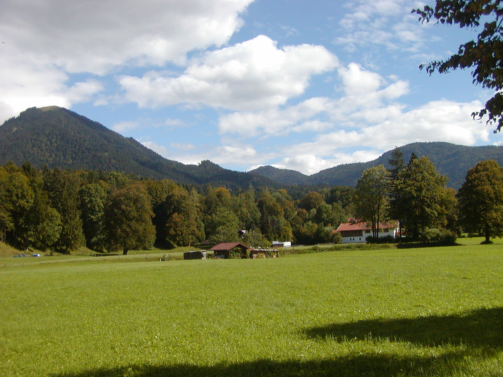 Im Isarwinkel